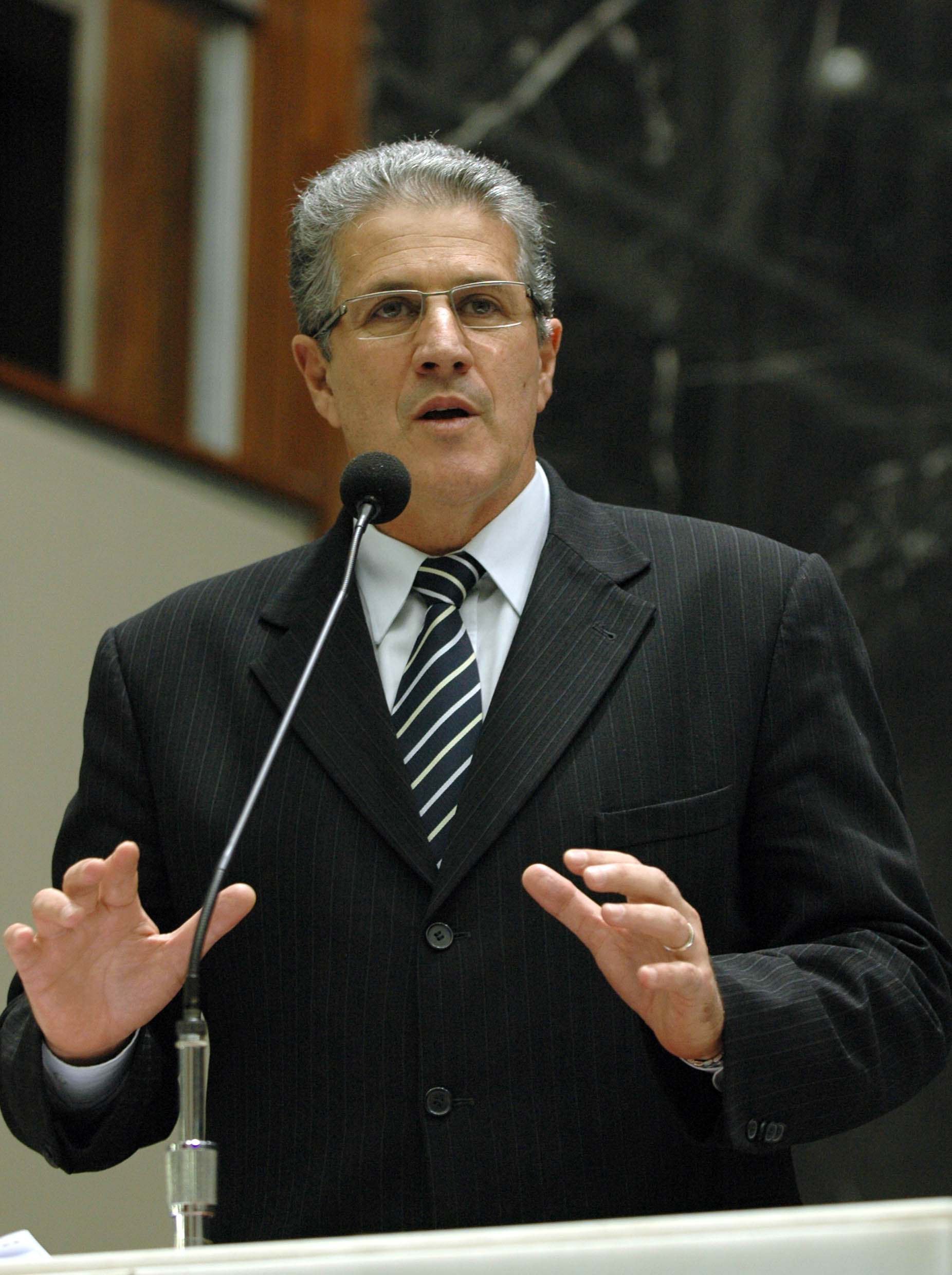 Deputado estadual João Leite da Silva Neto (PSDB-MG).